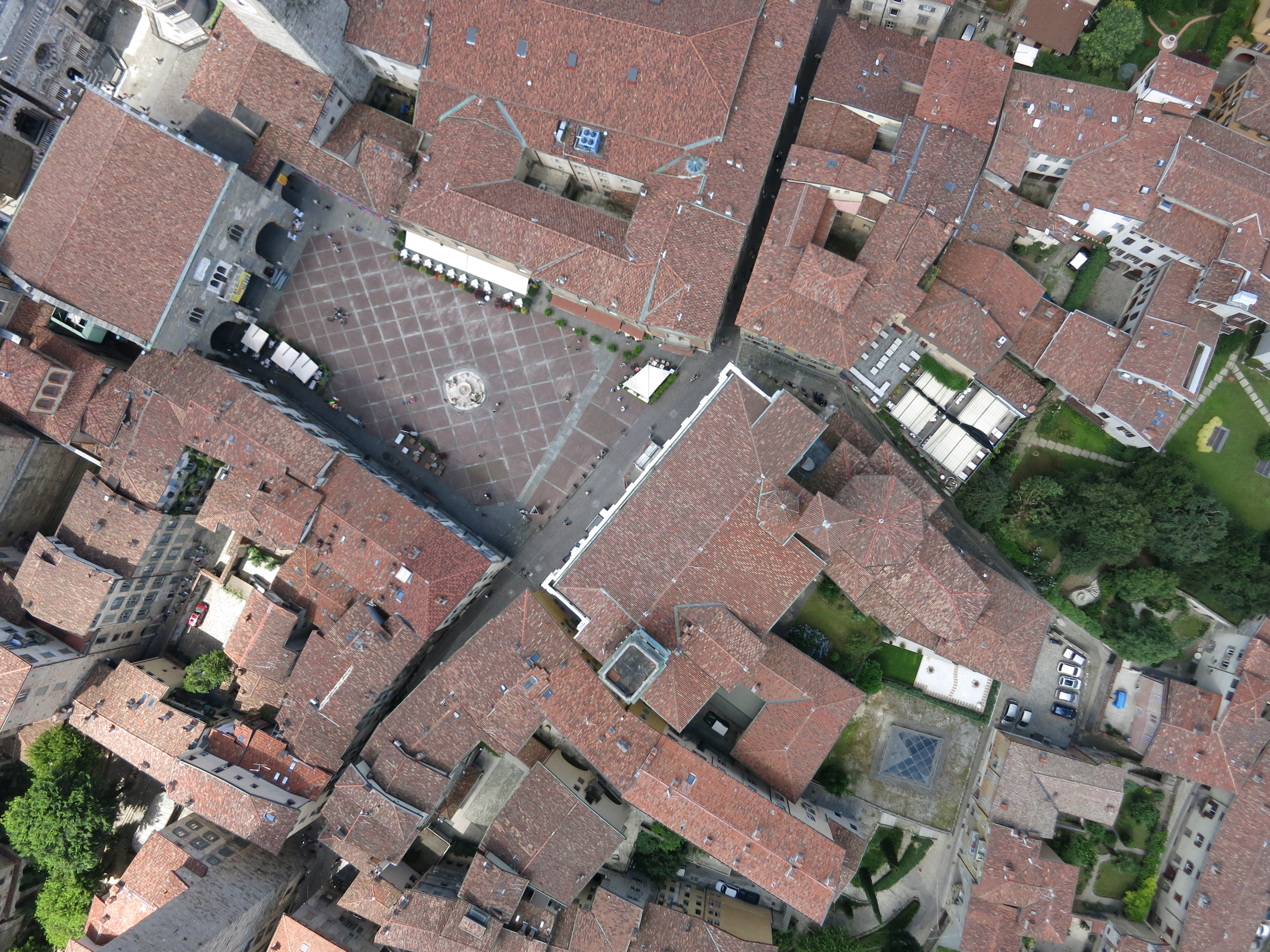 Aerfoto de Bérgamo kun Photogrammetric drone Horus Dynamics